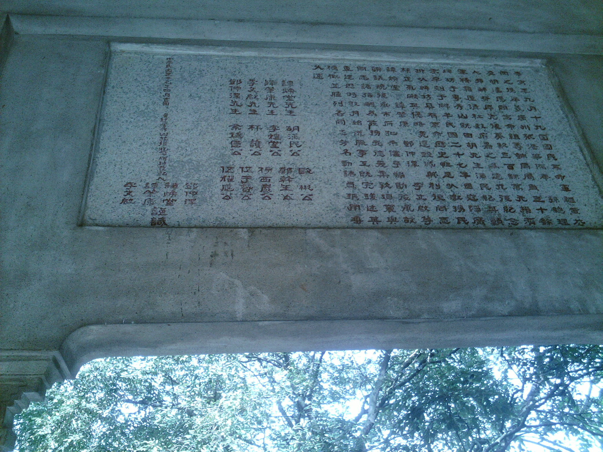 建造光復紀念亭梗概 辛亥年九月十九日國民革命軍繼黃公？之後舉義廣州。旅港華僑奉孫總理及胡漢民同志命組籌餉局局監三十餘人弗辭勞瘁，先後募款三百餘萬元，接濟軍糈，籍屋清社，政府嘉之。為建光復紀念牌坊于粵秀山。既由胡先生漢民紀其顯，余？刻于碑？。民國二十七年日寇？廣州，㕥（以）牌坊具有革命史？足㕥（以）激揚民族正氣？其侵略竟遭毀滅。？利後？志。譚煥堂 譚肇康 鄧仲澤 李文啟等？議規復。承市府批示儘予協助，後承故同志諸？嗣為叢務？？爰集款項襄與。重建歷時數月始成。厥事工既完竣，述其梗概，並臚列各同志芳名，勒諸貞珉，用垂久遠 譚煥堂先生 譚肇康先生 李文啟先生 鄧仲澤先生 胡漢民公 李煜堂公 林護公 余斌臣公 歐彬公 鄭幹生公 楊西巖公 伍于簪公 伍耀庭公 中華民國三十七年四月一日粵秀山？？？？？ 李文啟 譚煥堂 譚肇康 鄧仲澤 謹識